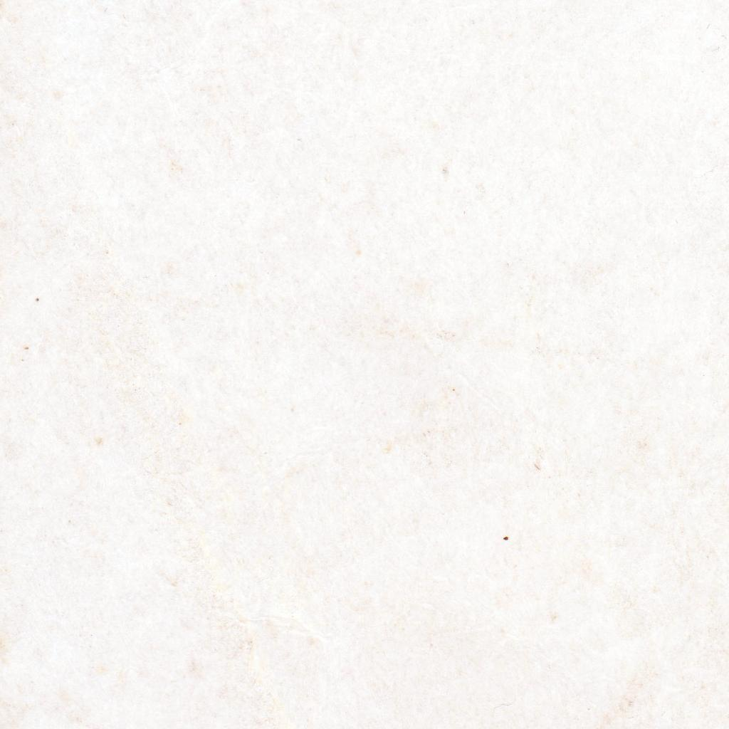 Glatte Oberfläche eines mittelalterlichen Pergaments.